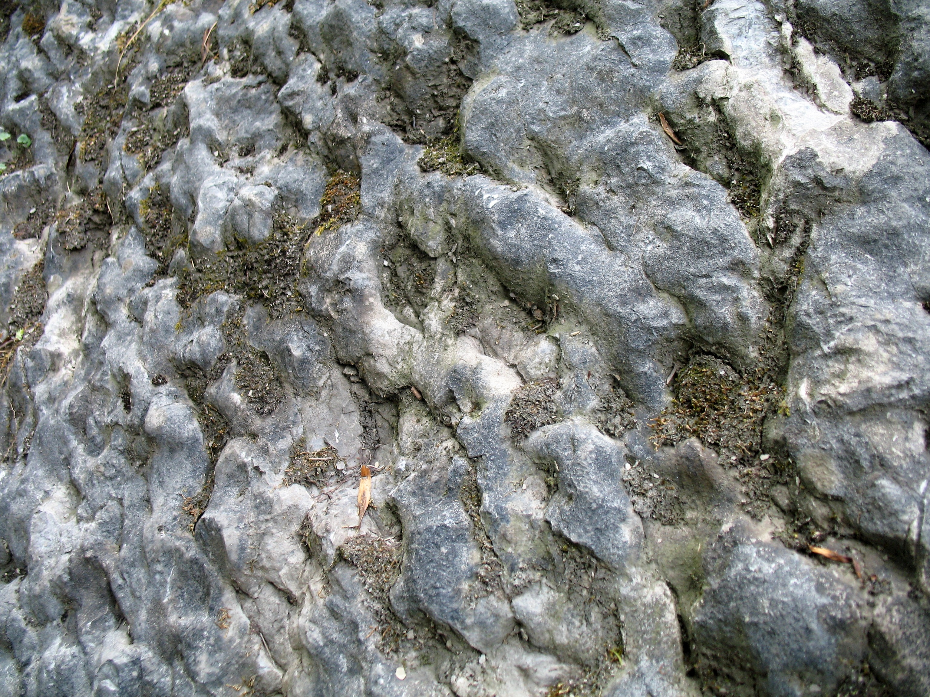 Přírodní památka Branické skaly na pravém břehu Vltavy v Praze. Detail povrchové struktury vápencových skal